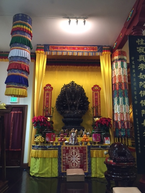 華藏寺千手觀音菩薩法像